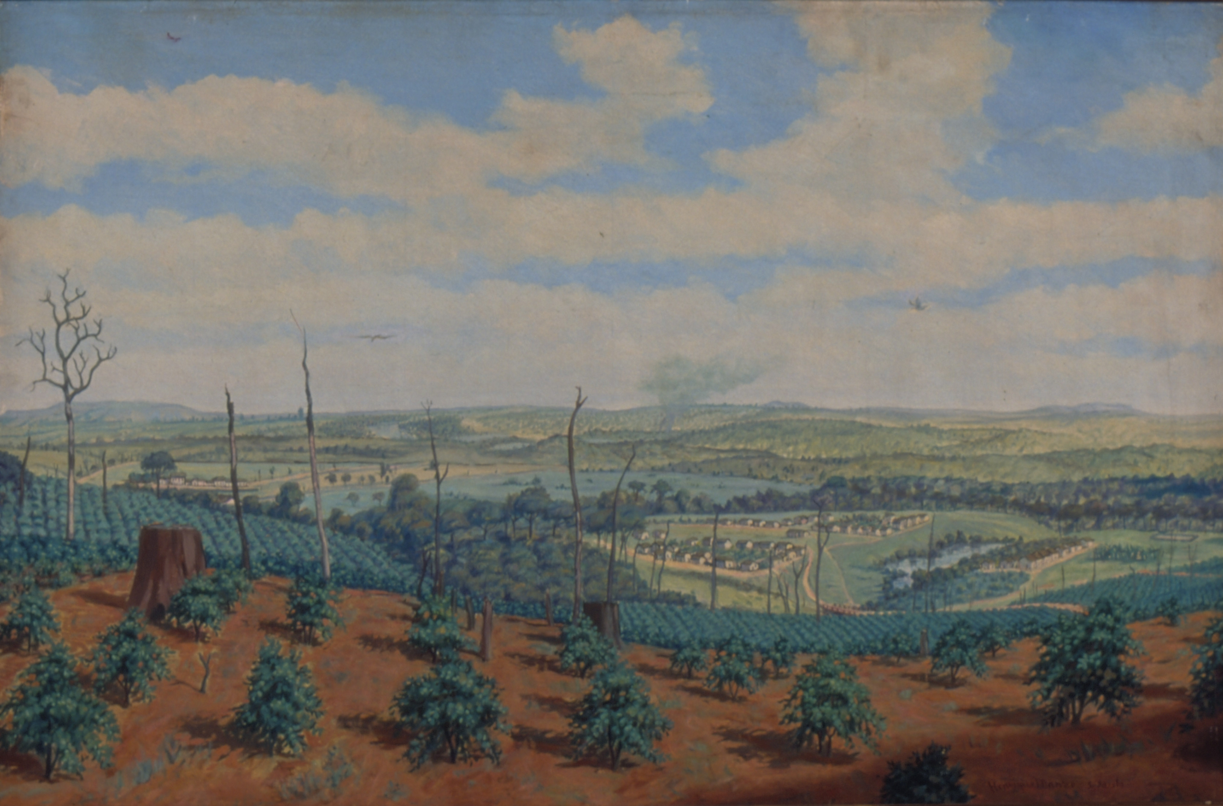 Obra que integra o acervo do Museu Paulista da USP. Coleção Fundo Museu Paulista - FMP